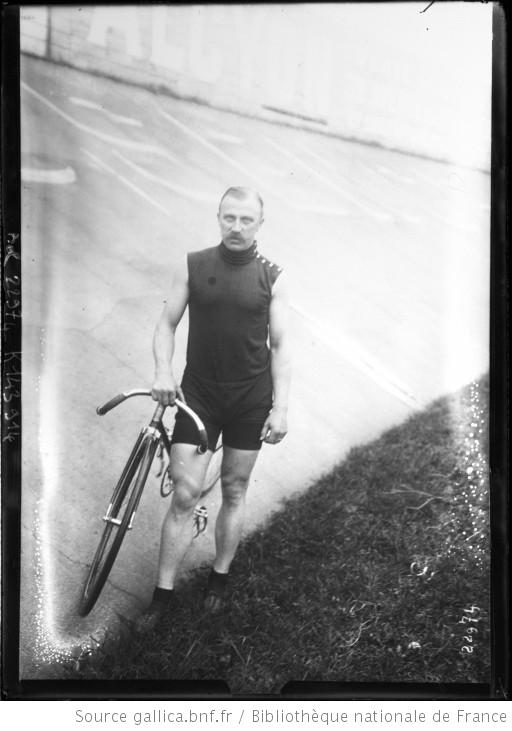 Thorvald Ellegaard [portrait du coureur cycliste avant le départ]